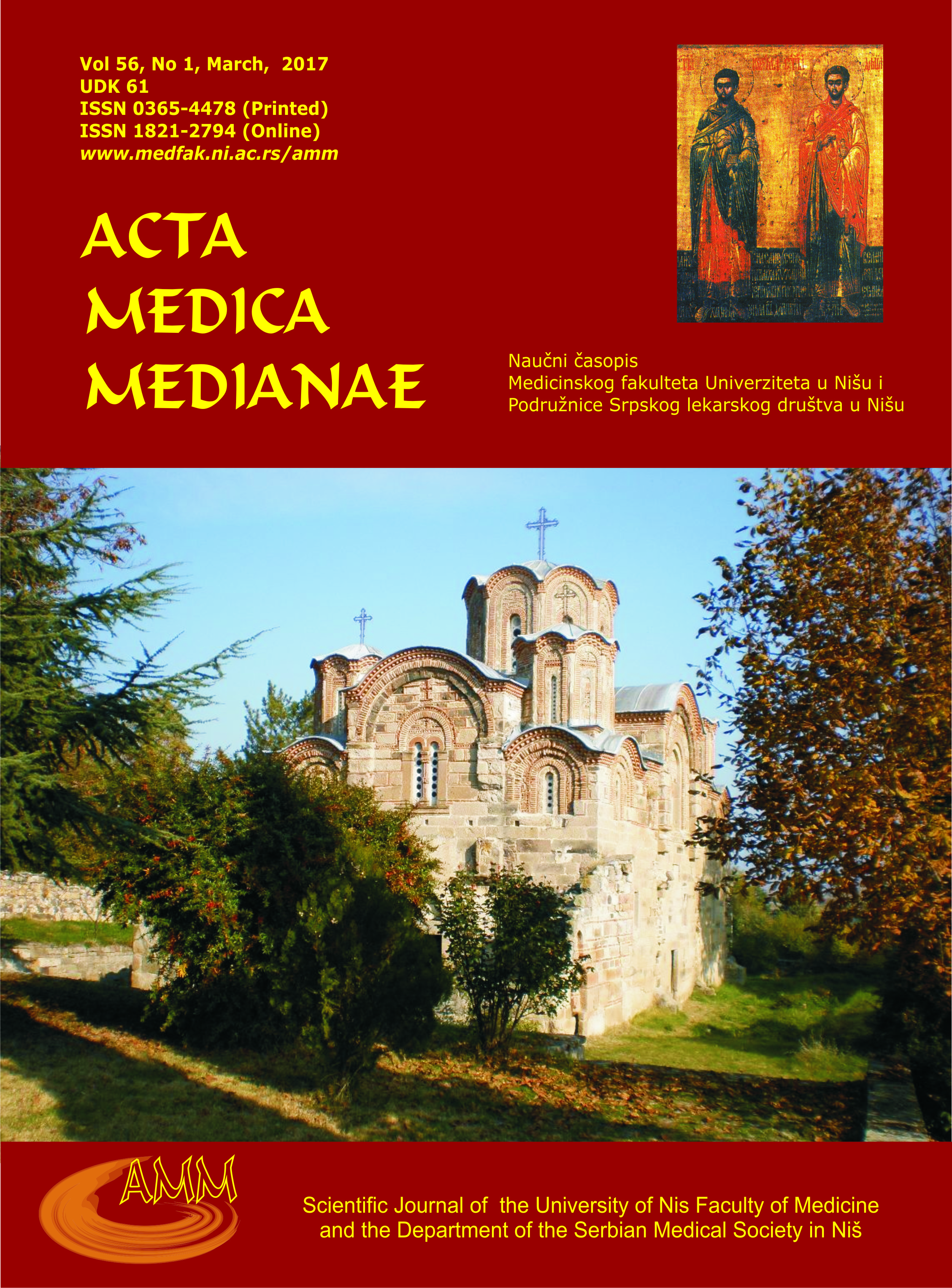 Naslovna strana časopisa